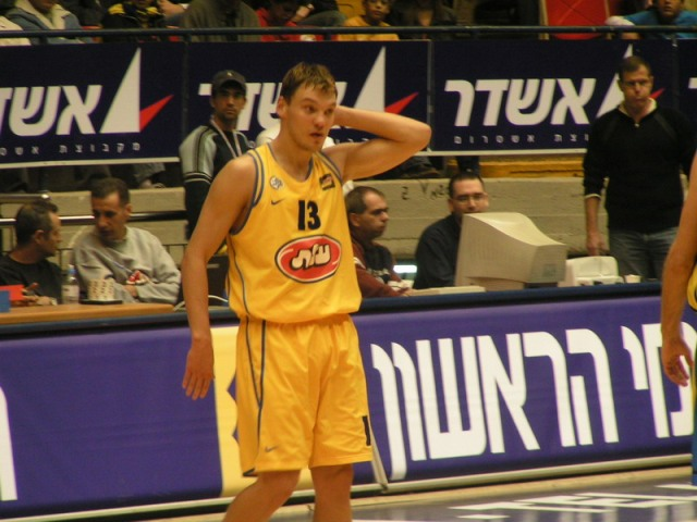 שאראס